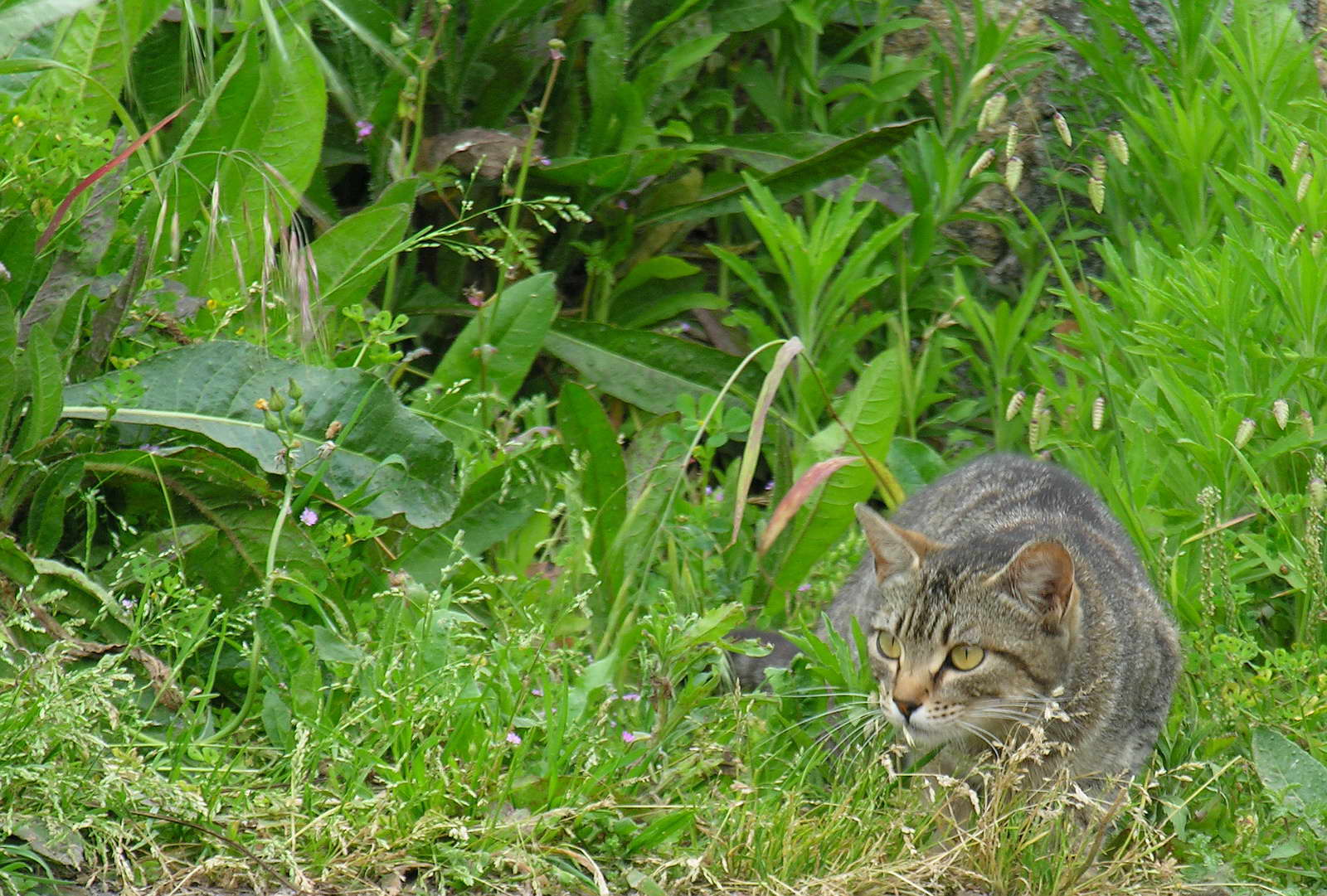 Gato fotografado en Barraña, Boiro (Galicia) cunha Nikon 8800 Publish by= Luis Miguel Bugallo Sánchez. Self made